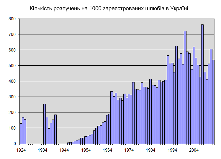 Відношення кількості розлучень до кількості шлюбів в Україні (УРСР) / Divorce to marriage ratio in Ukraine 1924-2010